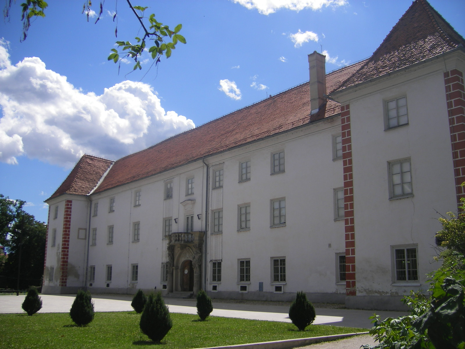 Muraszombat - Murska Sobota